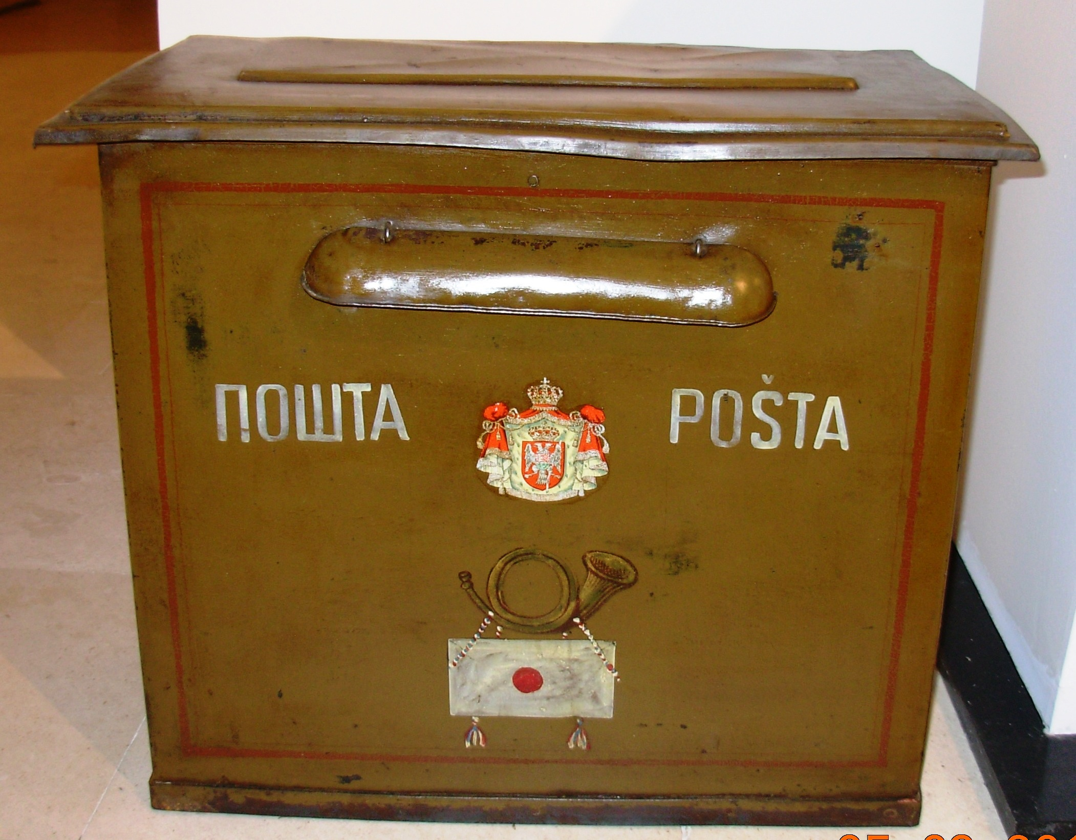 Poštansko sanduče iz 1925. godine. Muzej PTT-a, Beograd. Slikao Goldfinger